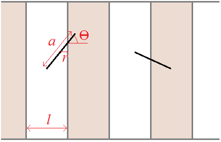 aiguille de Buffon